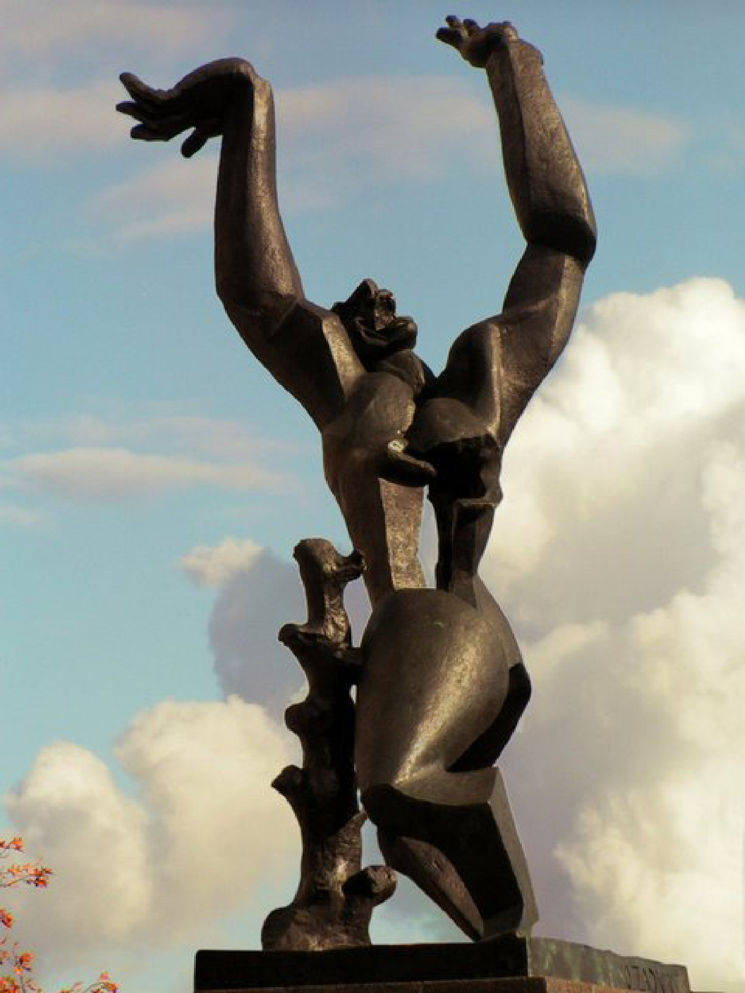 Zadkine 's destroyed city